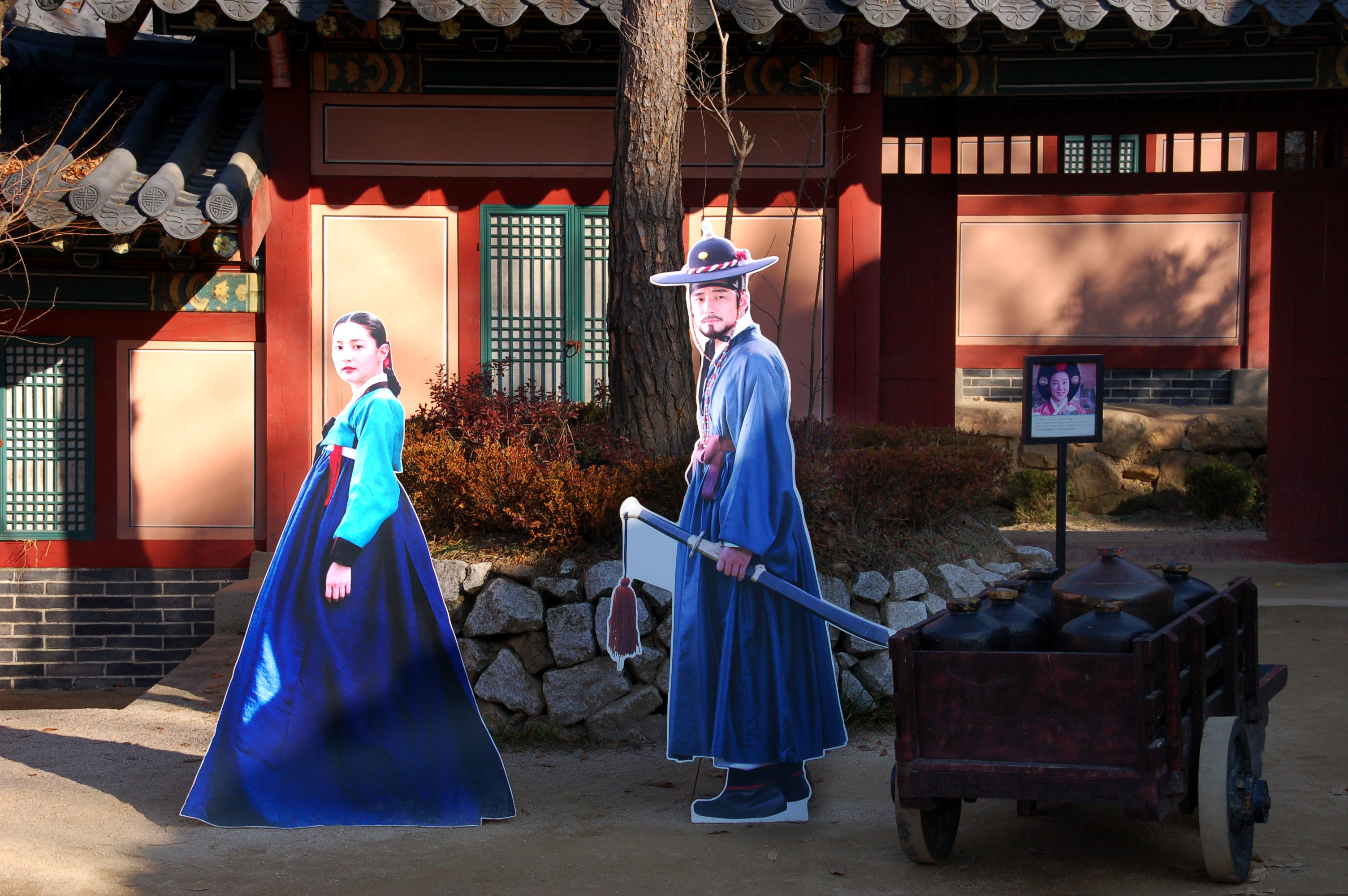 Nov 23, 2006 at 14:27 KST, 大長今パーク